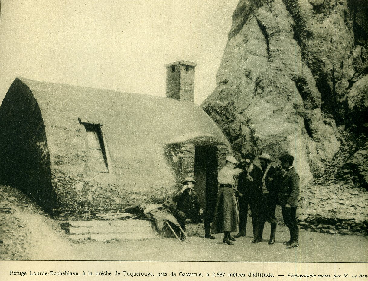 Refuge Lourde-Rocheblave, à la brèche de Tuquerouye, près de Gavarnie à 2687 m d'altitude.